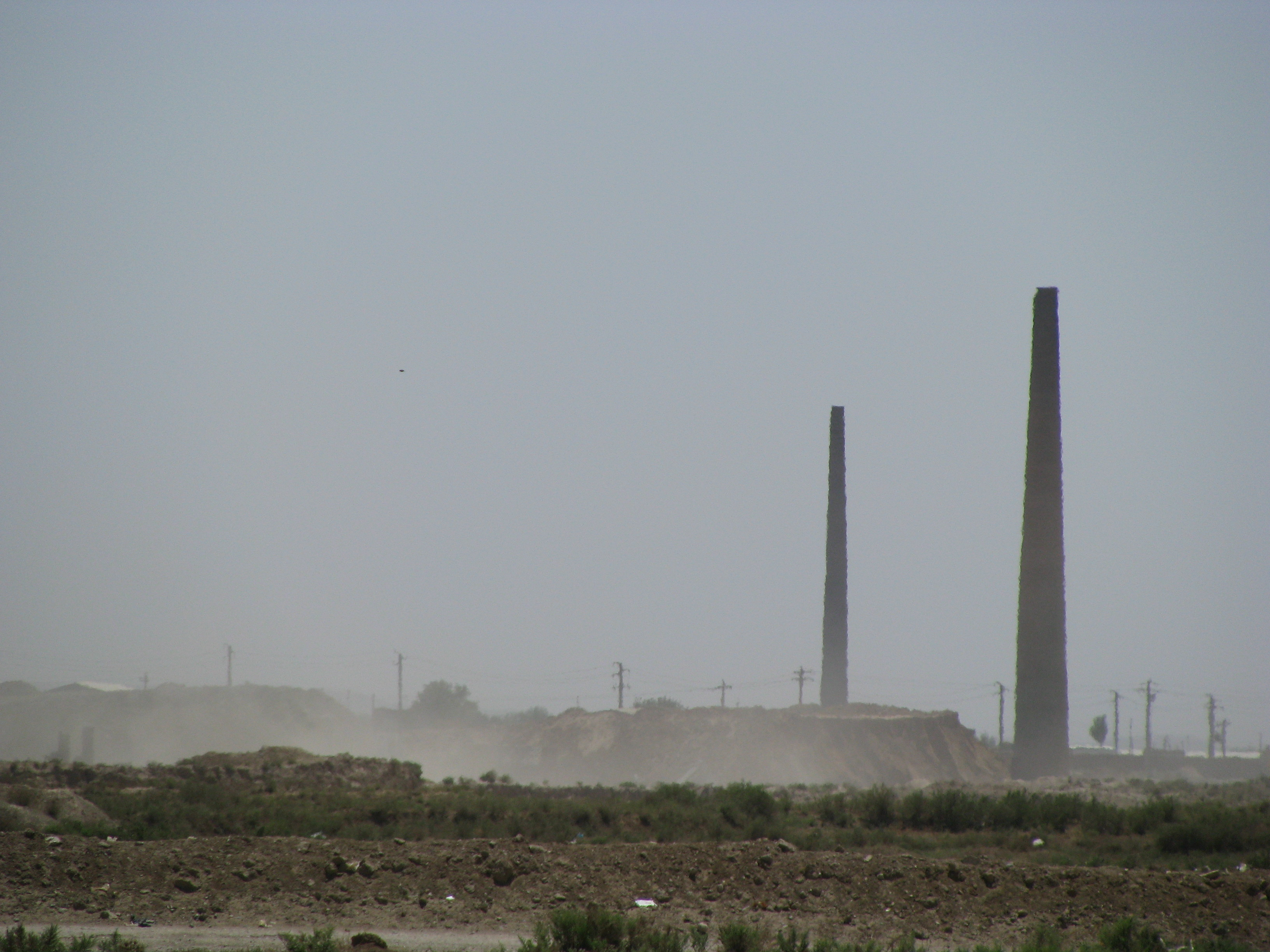 شرکتهای آجرسازی در کوجوار